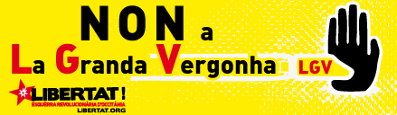 Autocollant Libertat : Non a La Granda Vergonha (LGV)